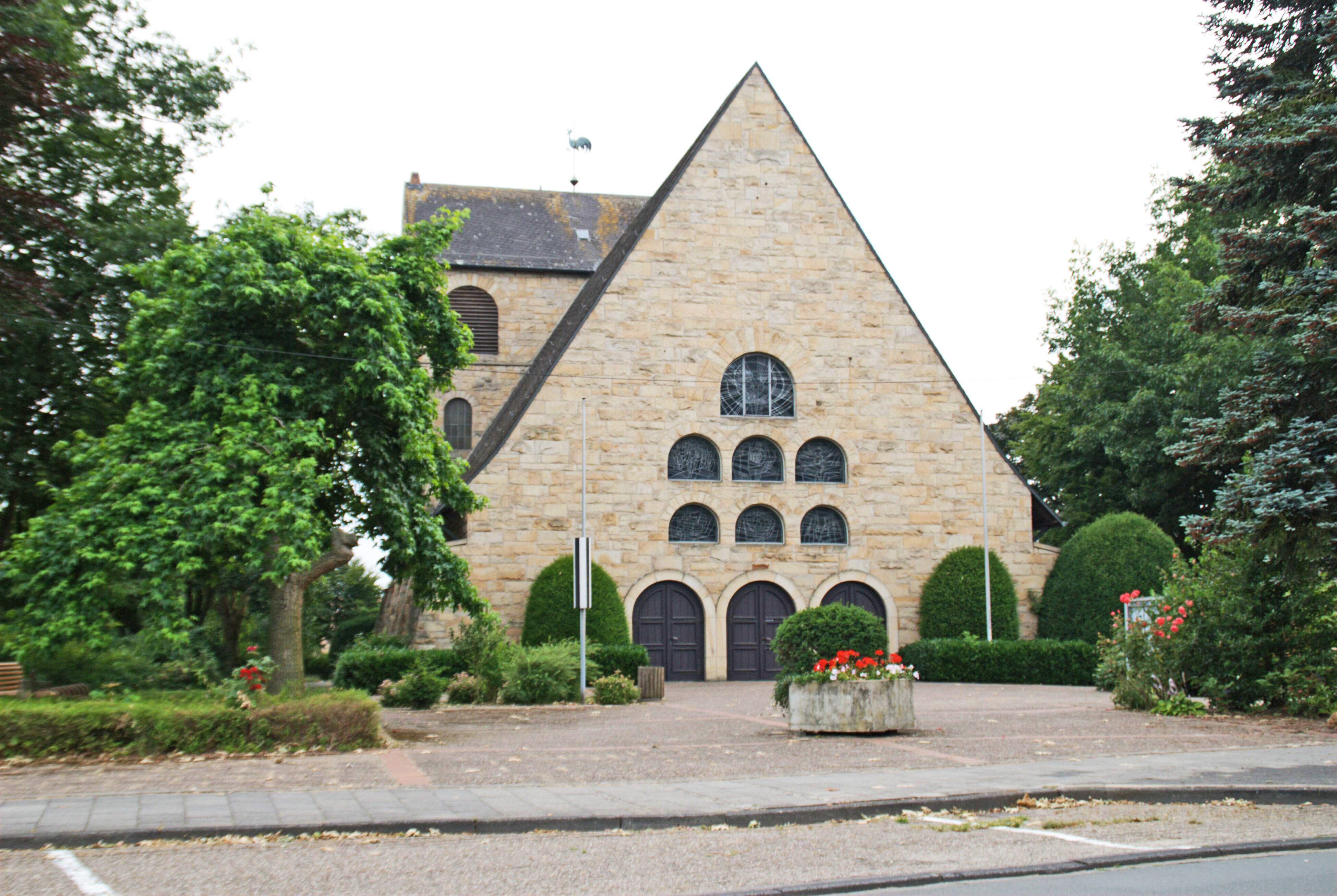 Römisch-katholische Herz-Jesu-Kirche in Püsselbüren, Stadtteil von Ibbenbüren, Kreis Steinfurt, Nordrhein-Westfalen, Deutschland.